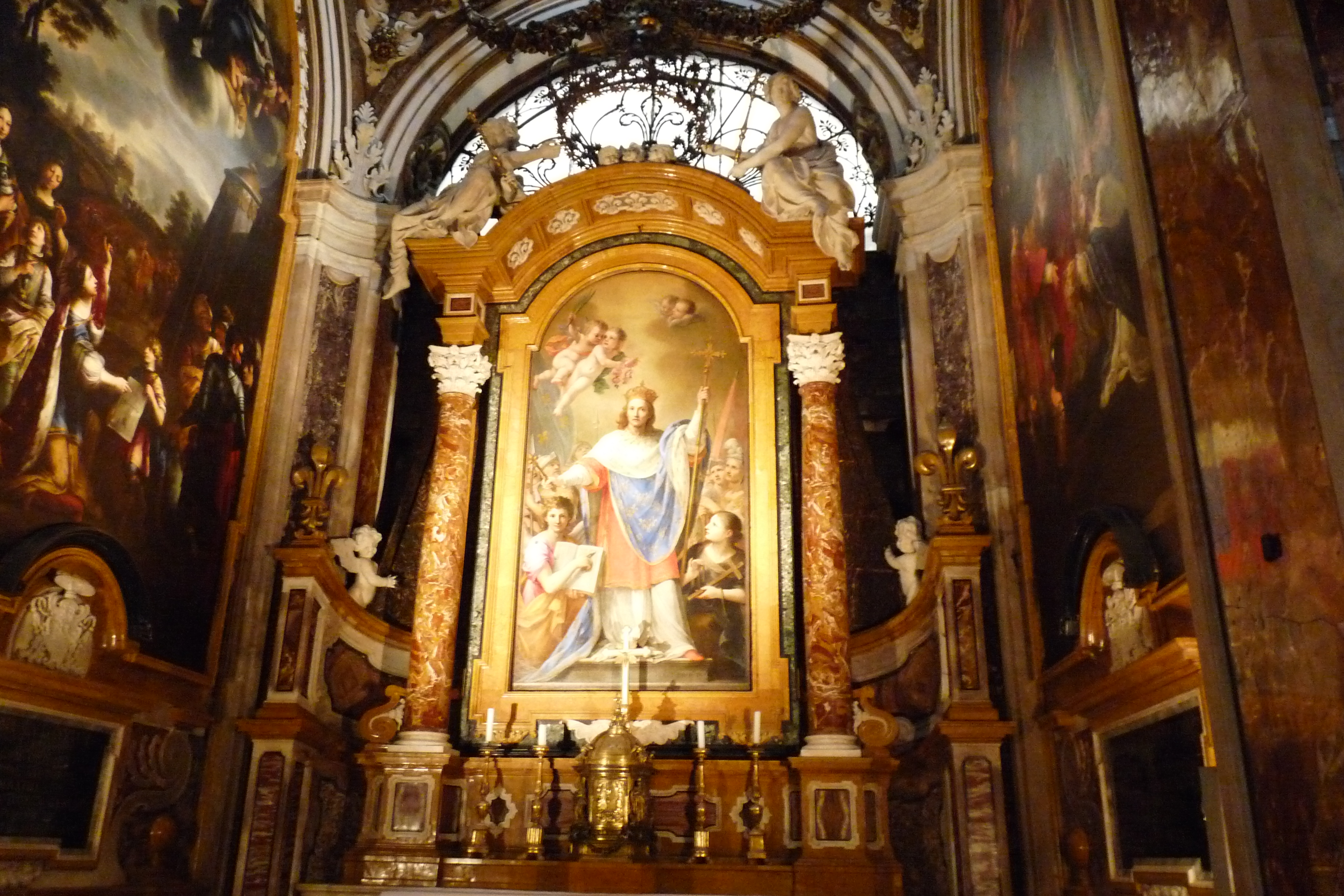 Chapelle latérale de l'église Saint-Louis-des-Français de Rome.